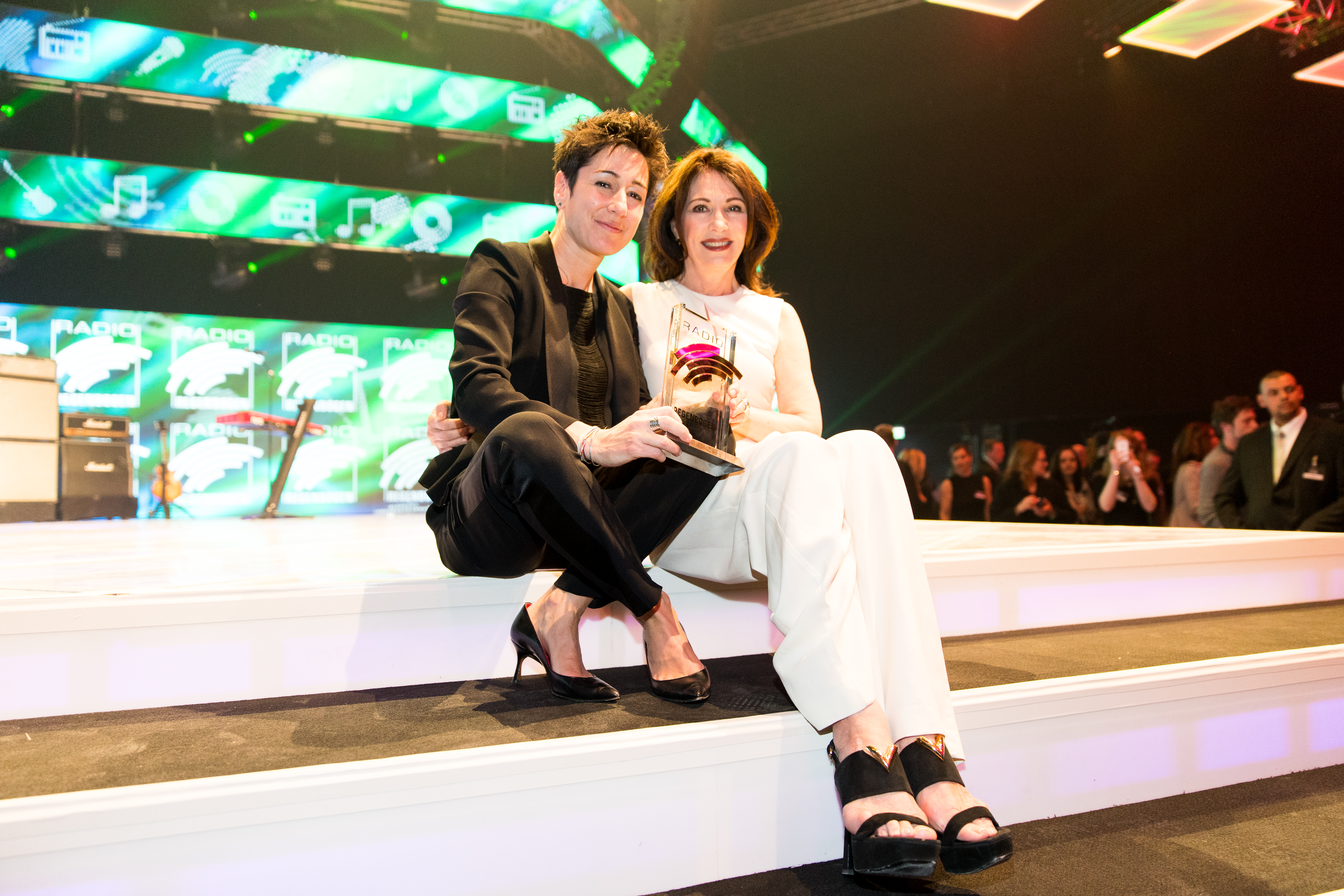 during Radio Regenbogen Award 2017 at Europapark, Rust, Baden-Württemberg, Germany on 2017-04-08, Photo: Sven Mandel